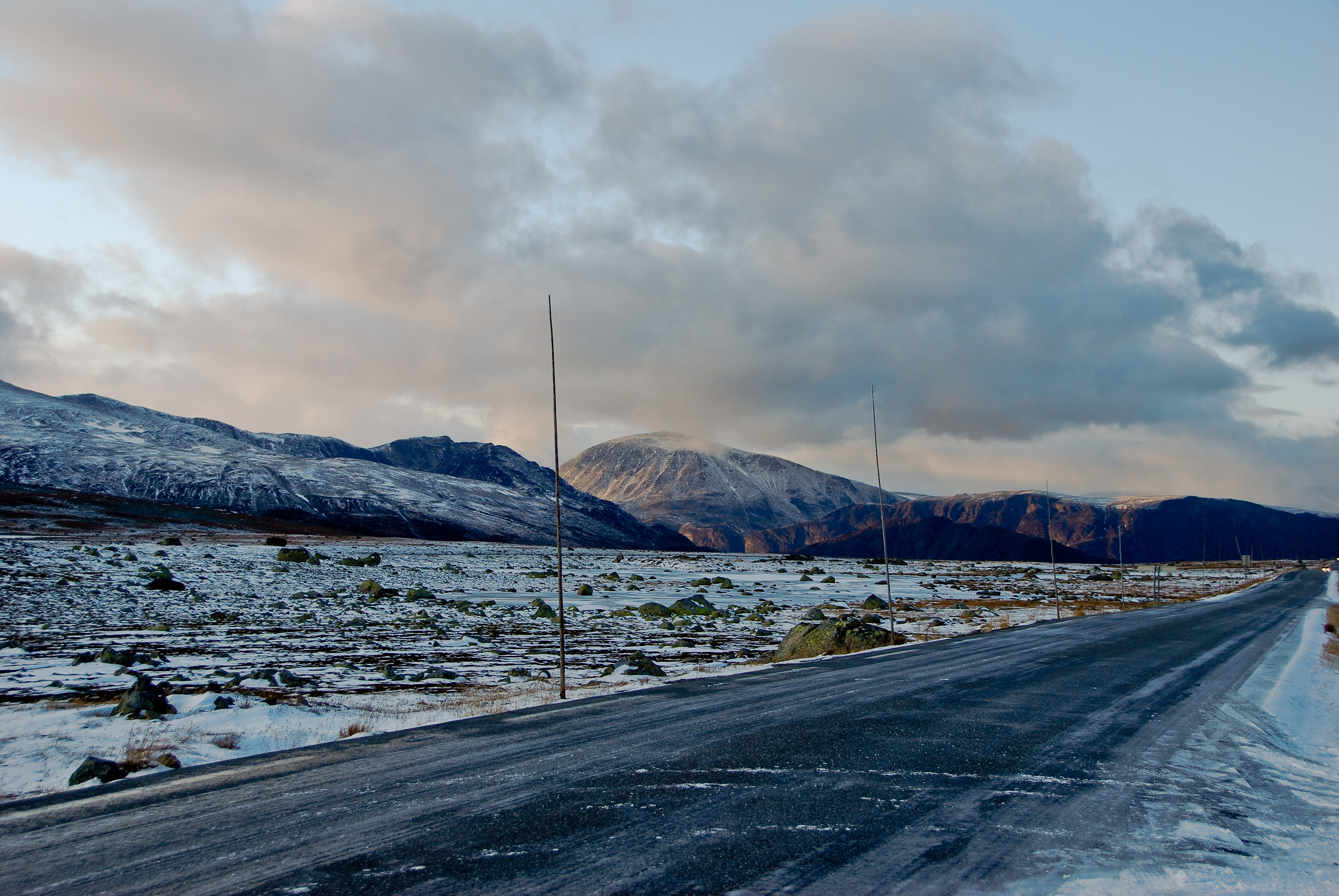 Valdresflya